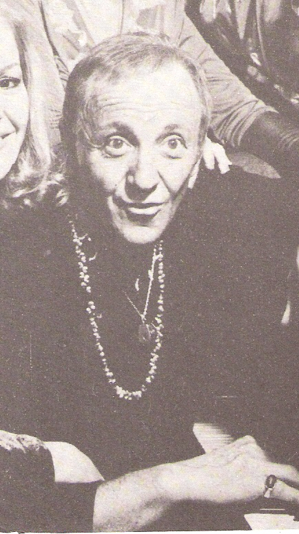 actor argentino pepe soriano